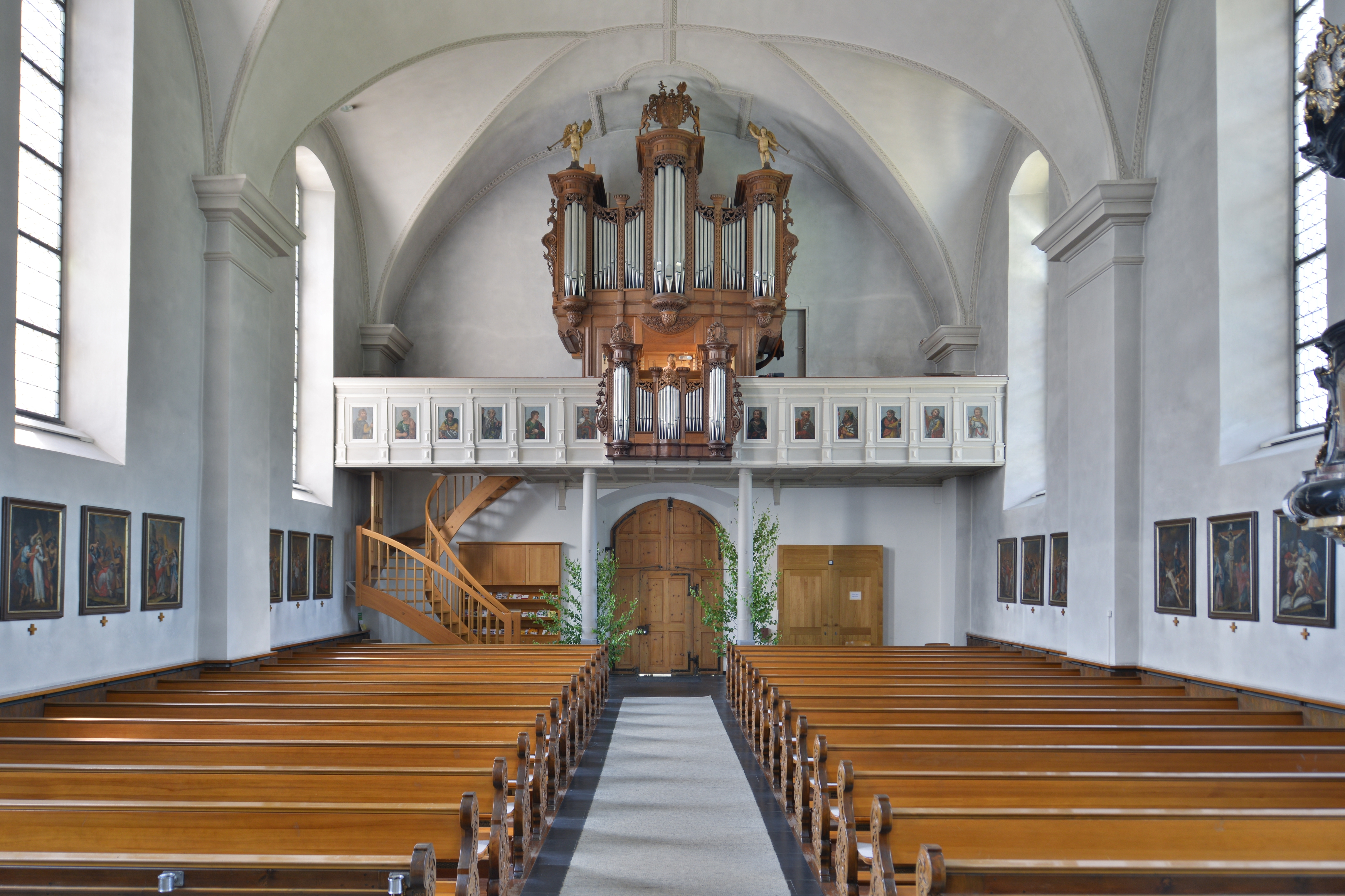 Kath. Pfarrkirche hl. Jakobus d. Ä. in Bludesch, mit Bergötzle-Orgel (1804).